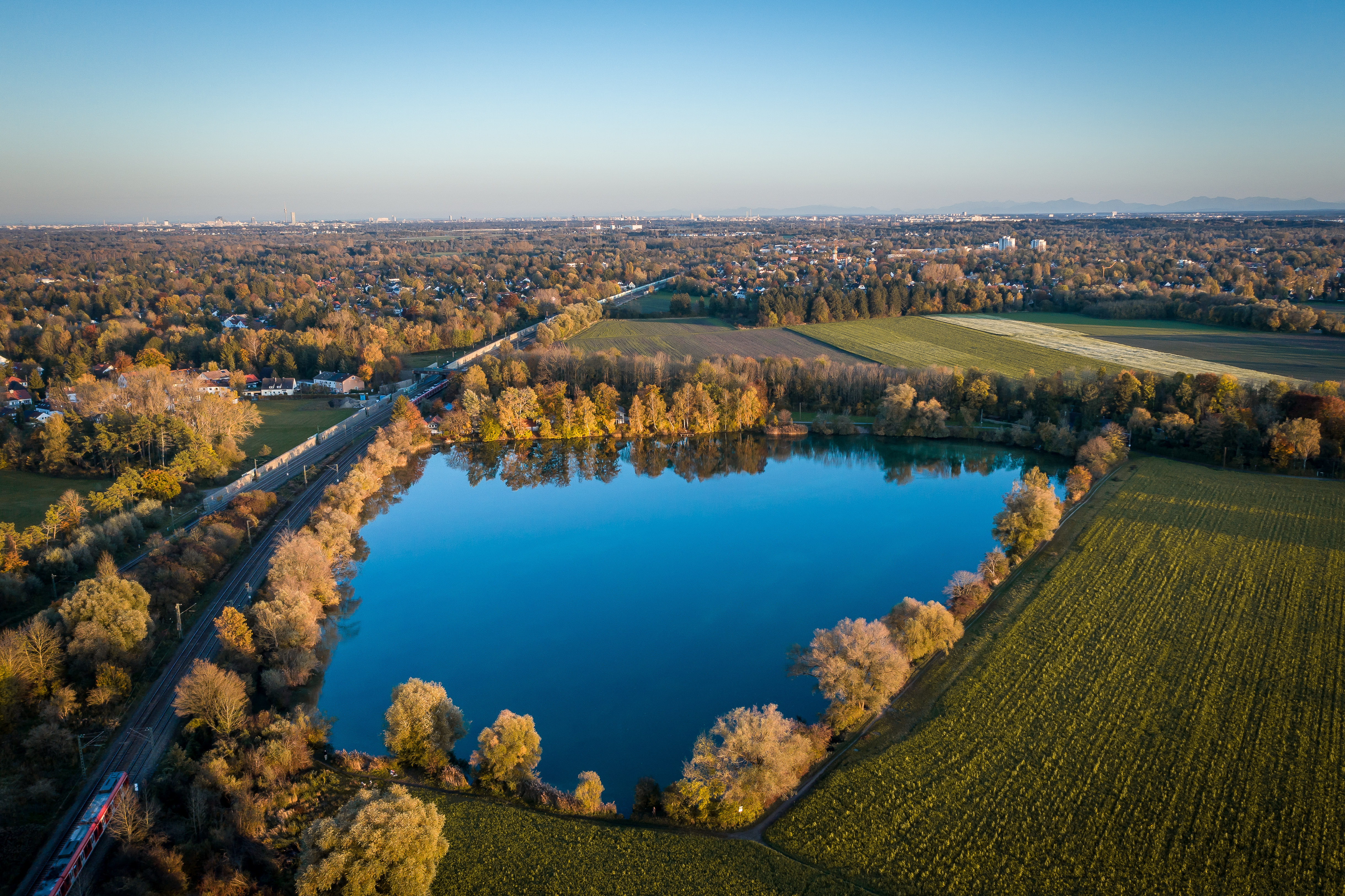 Luftaufnahme kleiner Olchinger See bei Föhn in Abendstimmung